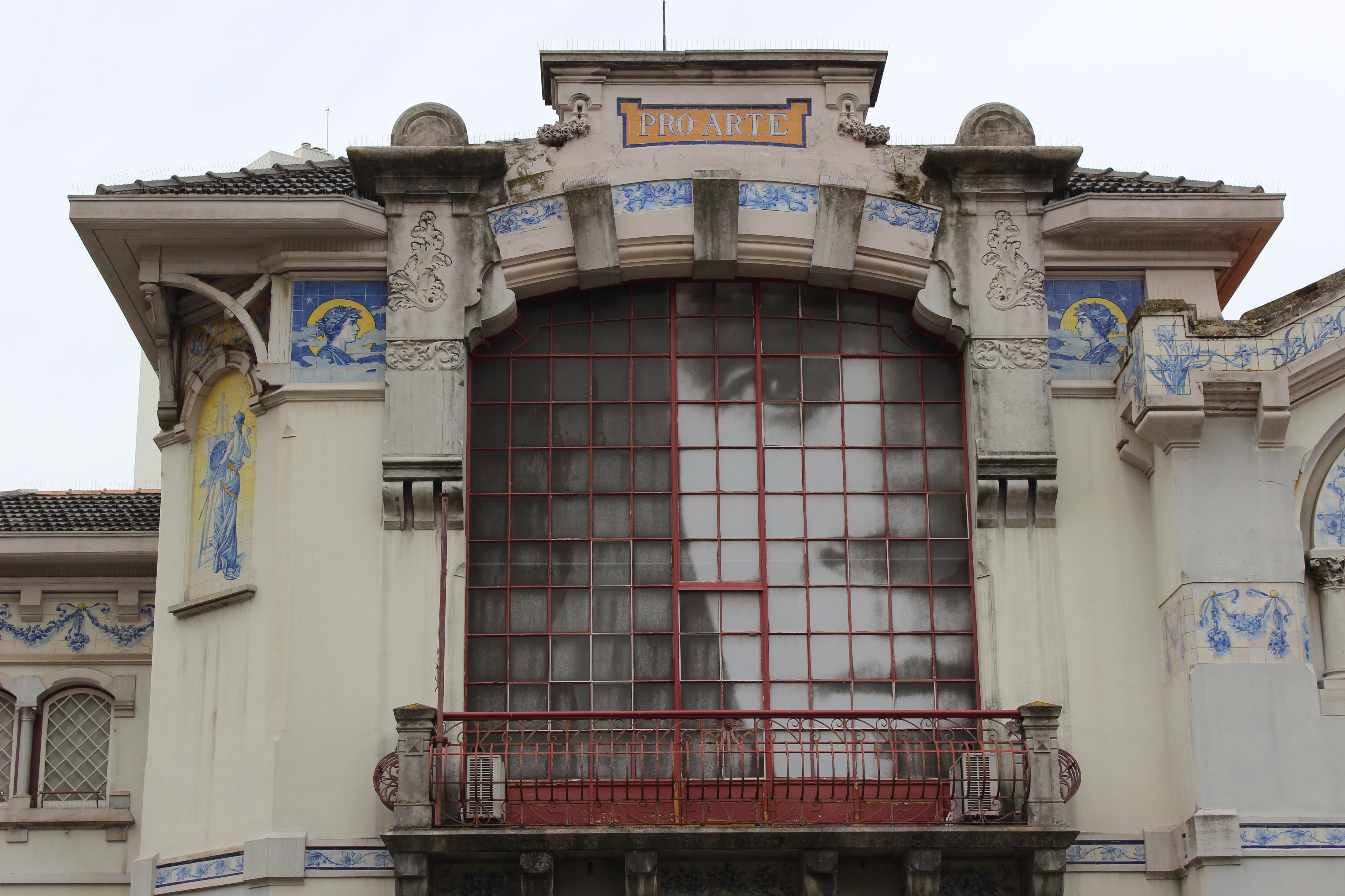 PRO ARTE